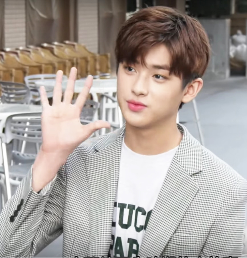 十九歲，旻奎台北見面會